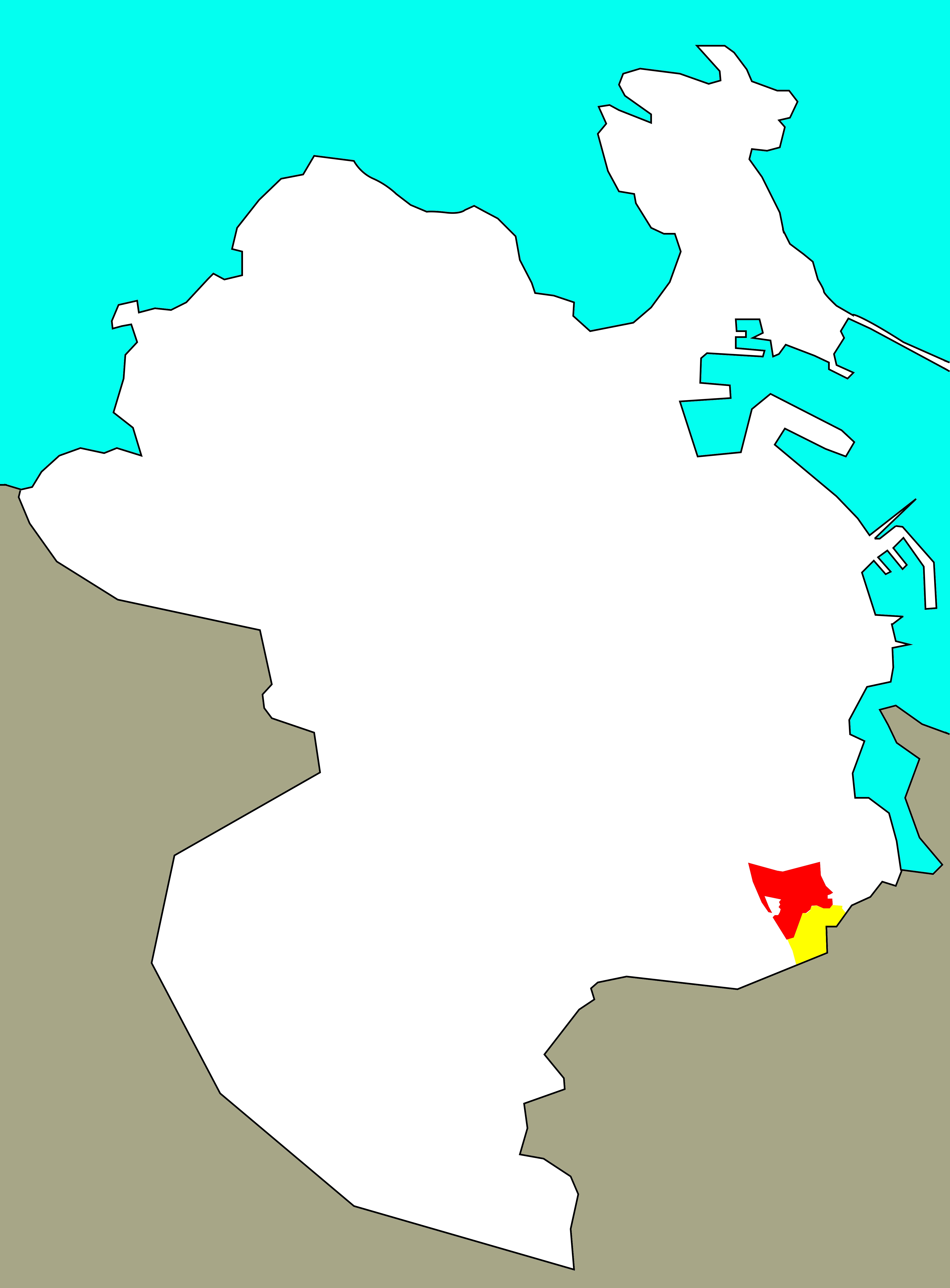 Situación de Palavea no concello da Coruña, segundo En amarelo, Fontaíña.